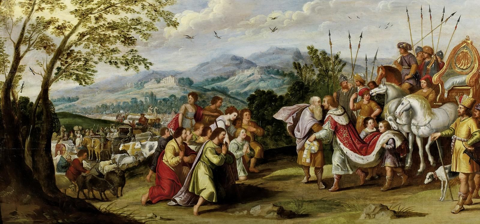 Anonym, flämisch, 17. Jh.: Joseph offenbart sich seinen Brüdern in Ägypten. Öl auf Eichenholz. 63 x 133,5 cm